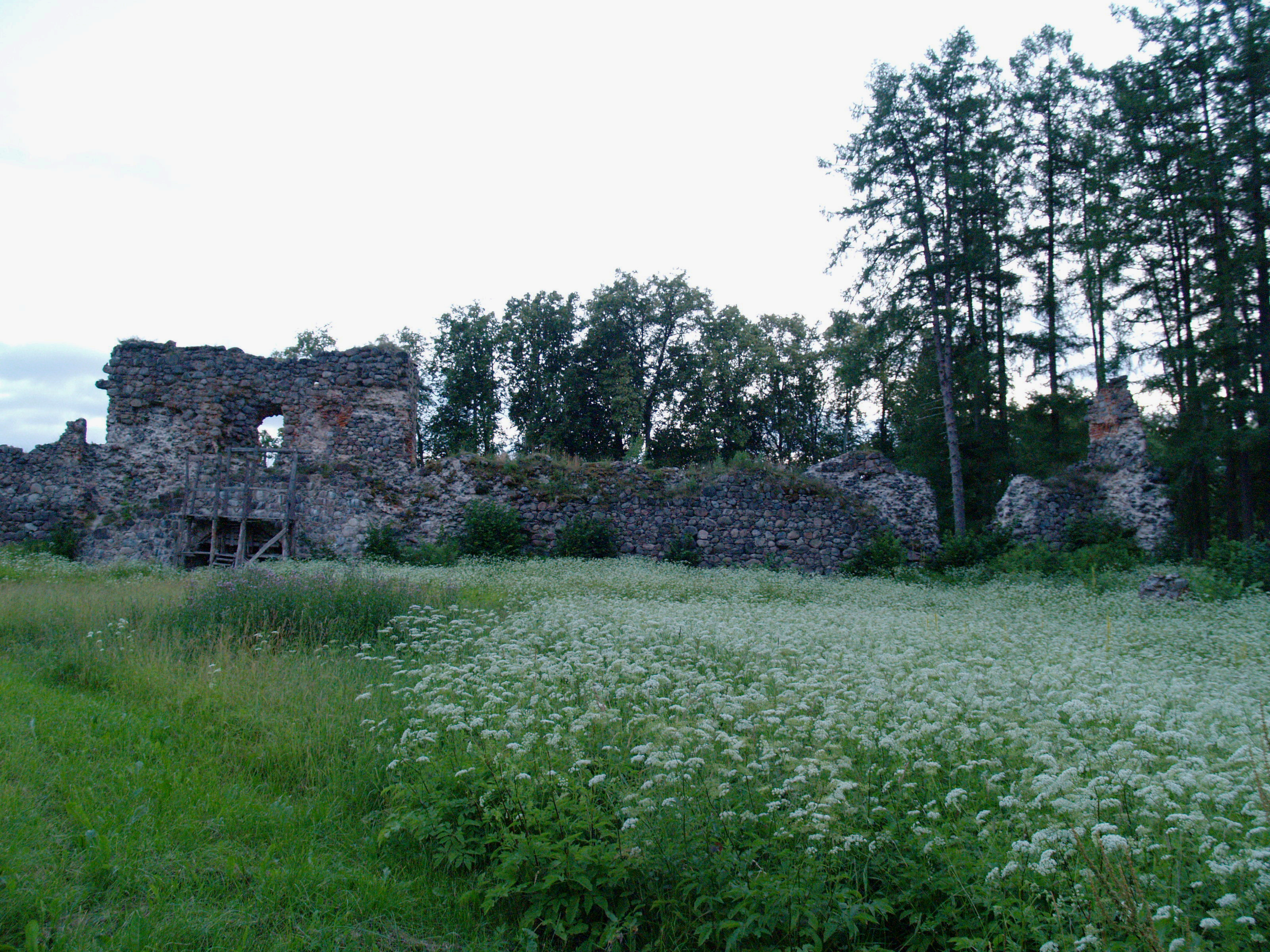 Härgmäe ordulinnuse siseõu.